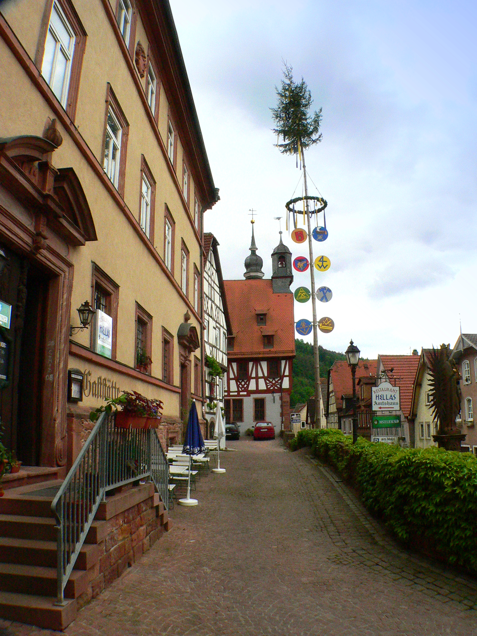 Freudenberg am Main, Stadthaus (vorne links) und Rathaus (hinten)